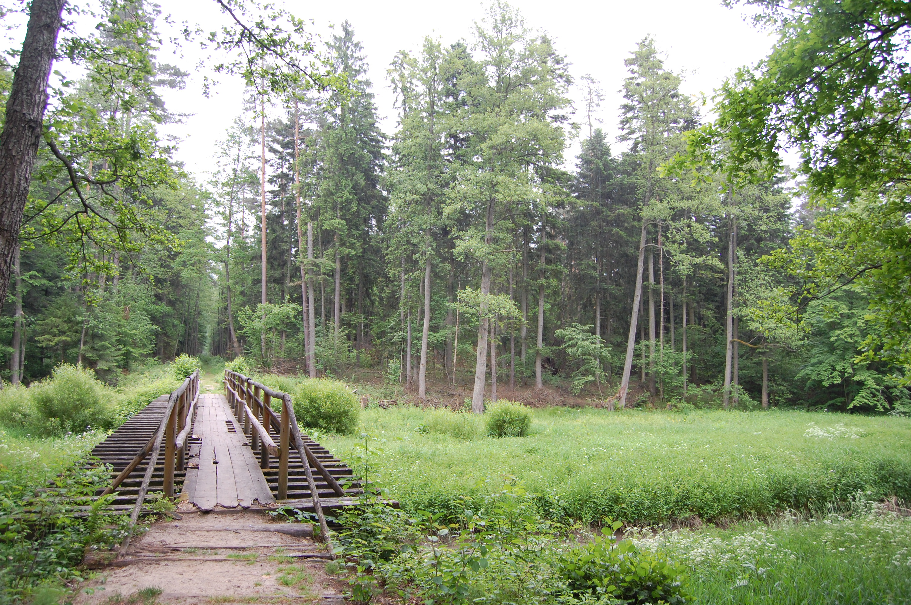 Porytowe Wzgórze - miejsce jednej z największych bitew partyzanckich okresu II wojny światowej. Był to finał niemieckiej akcji pacyfikacyjnej Sturmwind I (Wicher I), która rozegrała się w dniach 9-14 czerwca 1944 r. Do akcji przeciw partyzantom skierowano siły liczące ok. 30 tysięcy bardzo dobrze wyszkolonych żołnierzy (w tym 3 dywizje Wehrmachtu i samoloty 4 Floty Powietrznej). Zgrupowanie partyzanckie liczyło ok. 3000 ludzi. Wśród nich było 100 żołnierzy z AK i BCh, 700 z AL i 1900 partyzantów radzieckich. Po zaciętych walkach partyzanci wycofali się nocą z 14/15 czerwca w dalsze rejony Puszczy Solskiej. Zgrupowanie zachowało przy tym pełną zdolność bojową. Po wojnie na Porytowym Wzgórzu utworzono cmentarz partyzancki, odsłonięto także pomnik dłuta Bronisława Chromego. Przedstawia on 5 biegnących partyzantów, pomiędzy którymi wybucha granat. Obok krzyż i głaz pamięci żołnierzy AK i BCh.